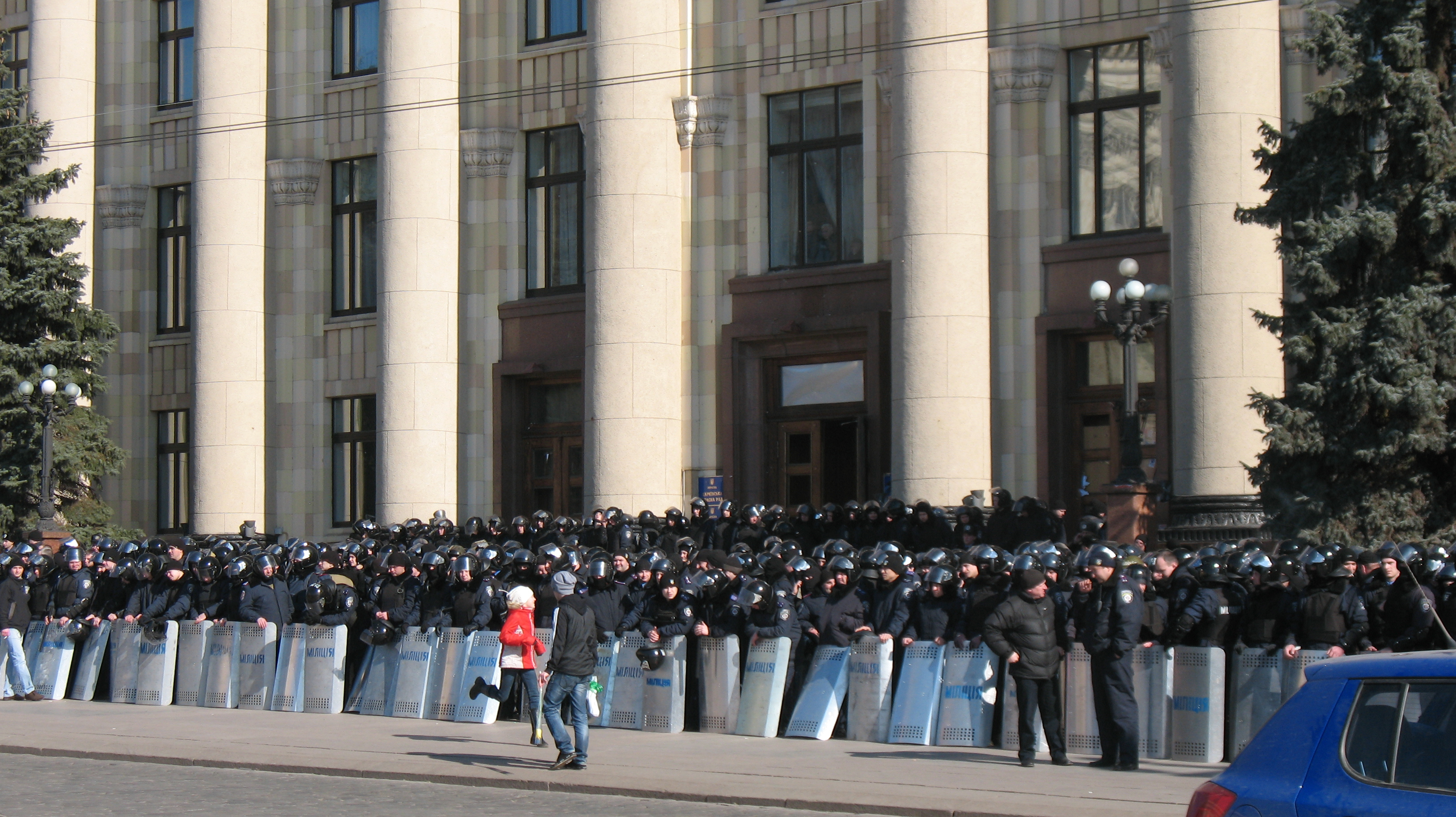 Харьков, 8 марта. Площадь Свободы. Областная администрация. Милиционеры в шлемах и со щитами, стерегущих здание. В первых рядах - сотрудники с шевронами МВД Харьковской Области, сзади - центральные области Украины. Перед рядами по тротуару бежит девочка и идёт парень с цветами к 8 марта.